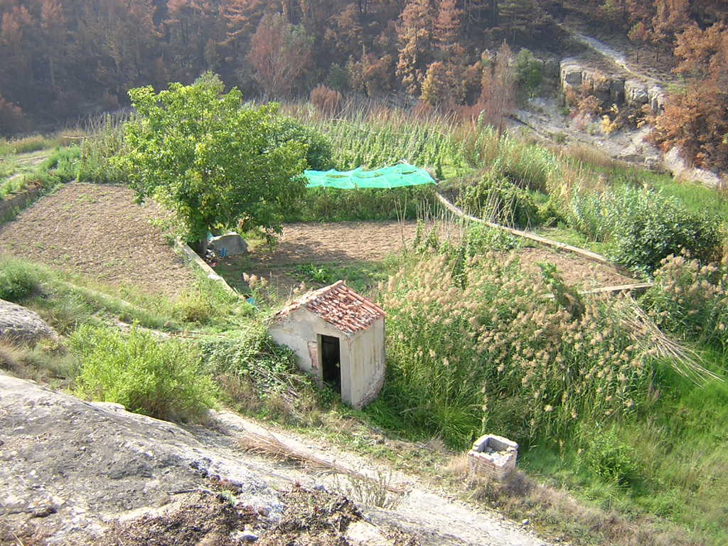 Els Horts del Molí de Saladic (Monistrol de Calders, Moianès)